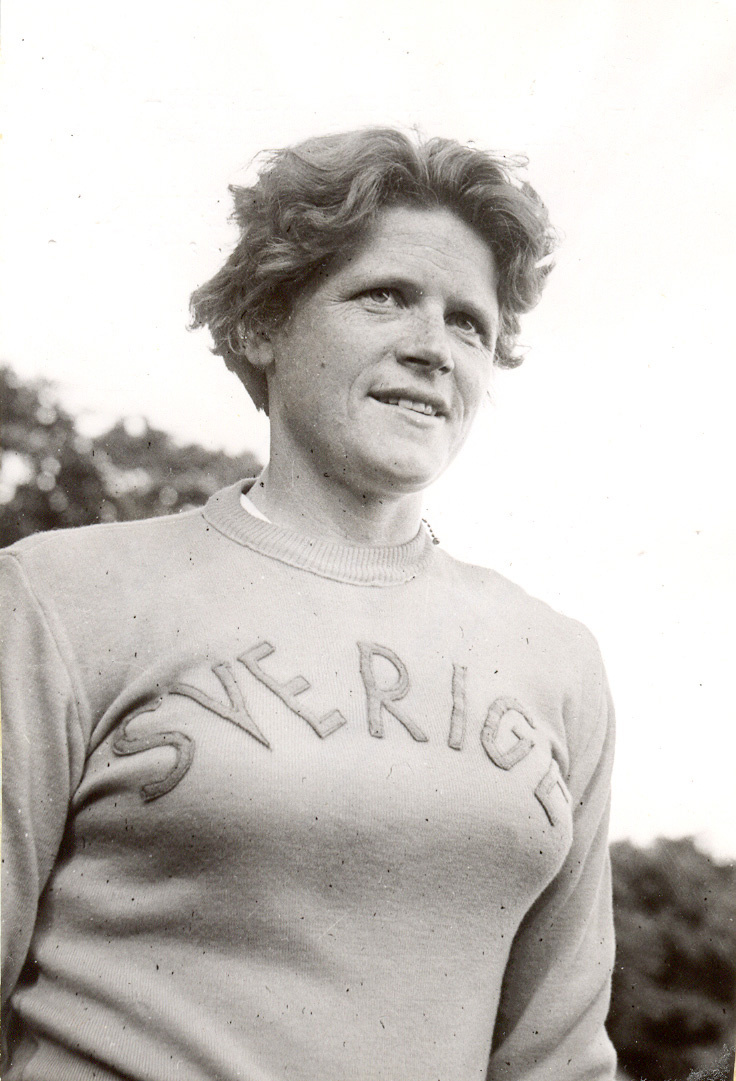 Eivor Lagman Olsson